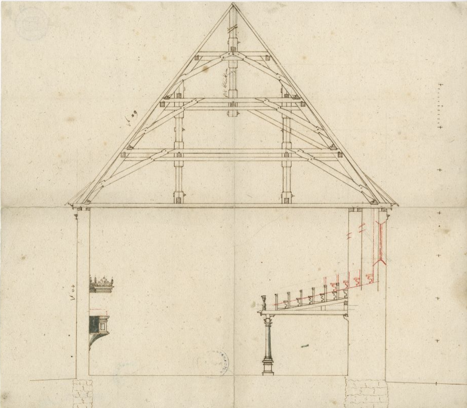 Die Stadtmauer (rechts) bildet die Westwand. Dort ist das Mittelstück der Dreiseiten-Empore mit Blickrichtung zur Kanzel im Schnitt dargestellt. Diese Anlage einer Querkirche wurde 1770 zu einer Längsorientierung nach Norden mit Umlaufempore umgebaut.